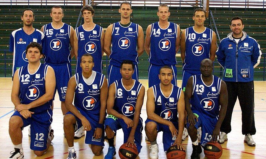 chartres